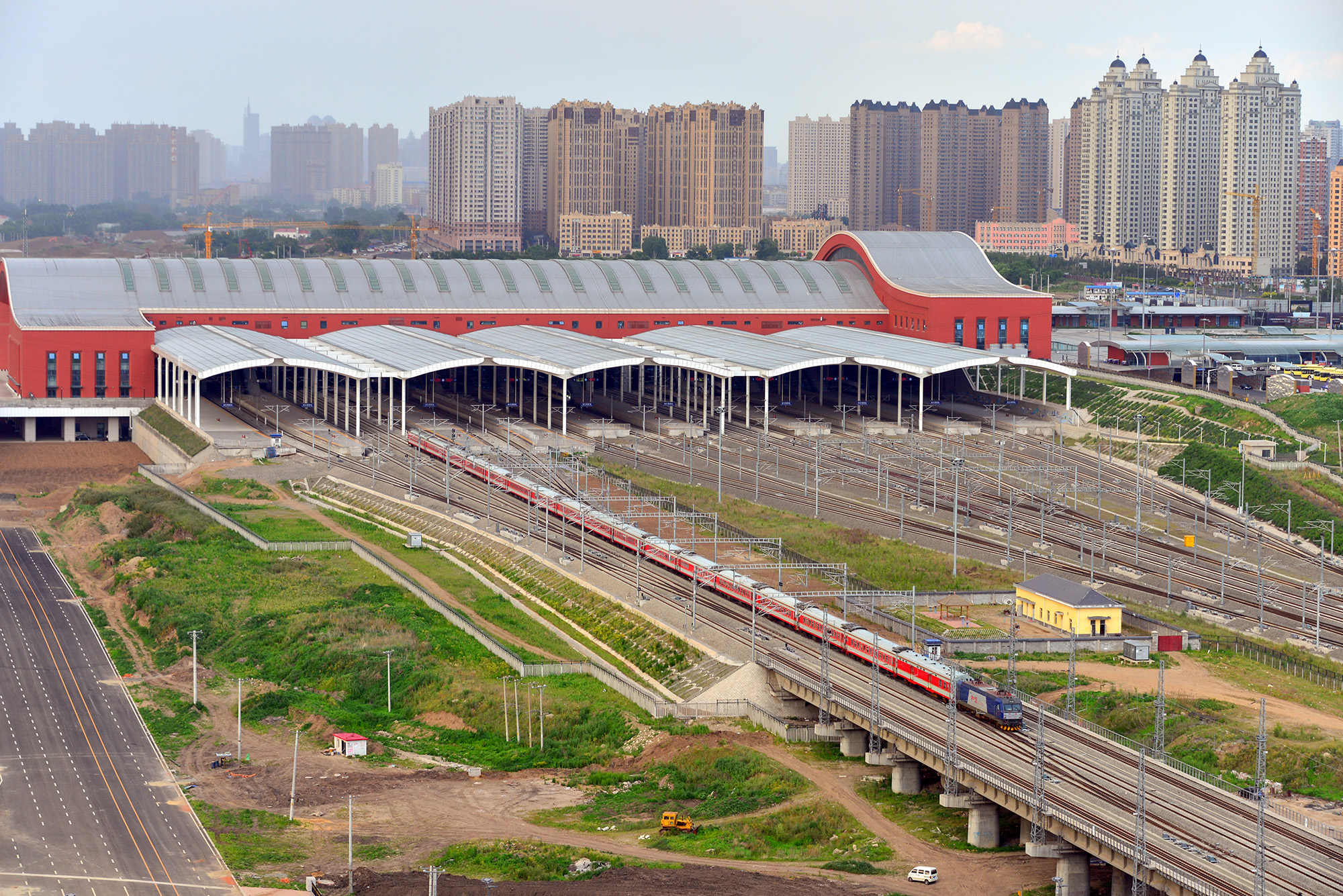 K296次哈尔滨西站通过